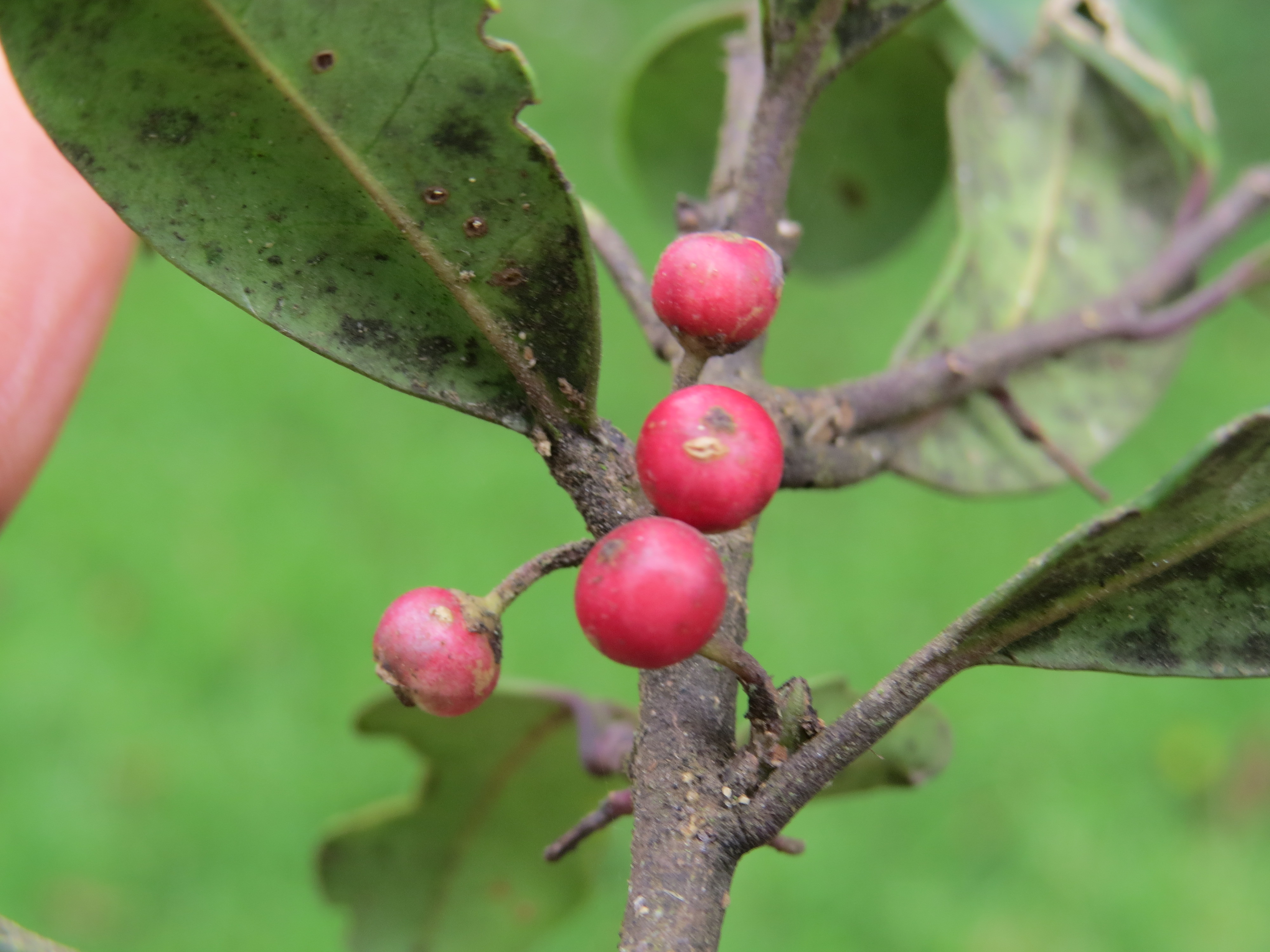 Photos taken at Mannavan Shola, Anamudi Shola National Park, Kerala during Munnar Butterfly Survey